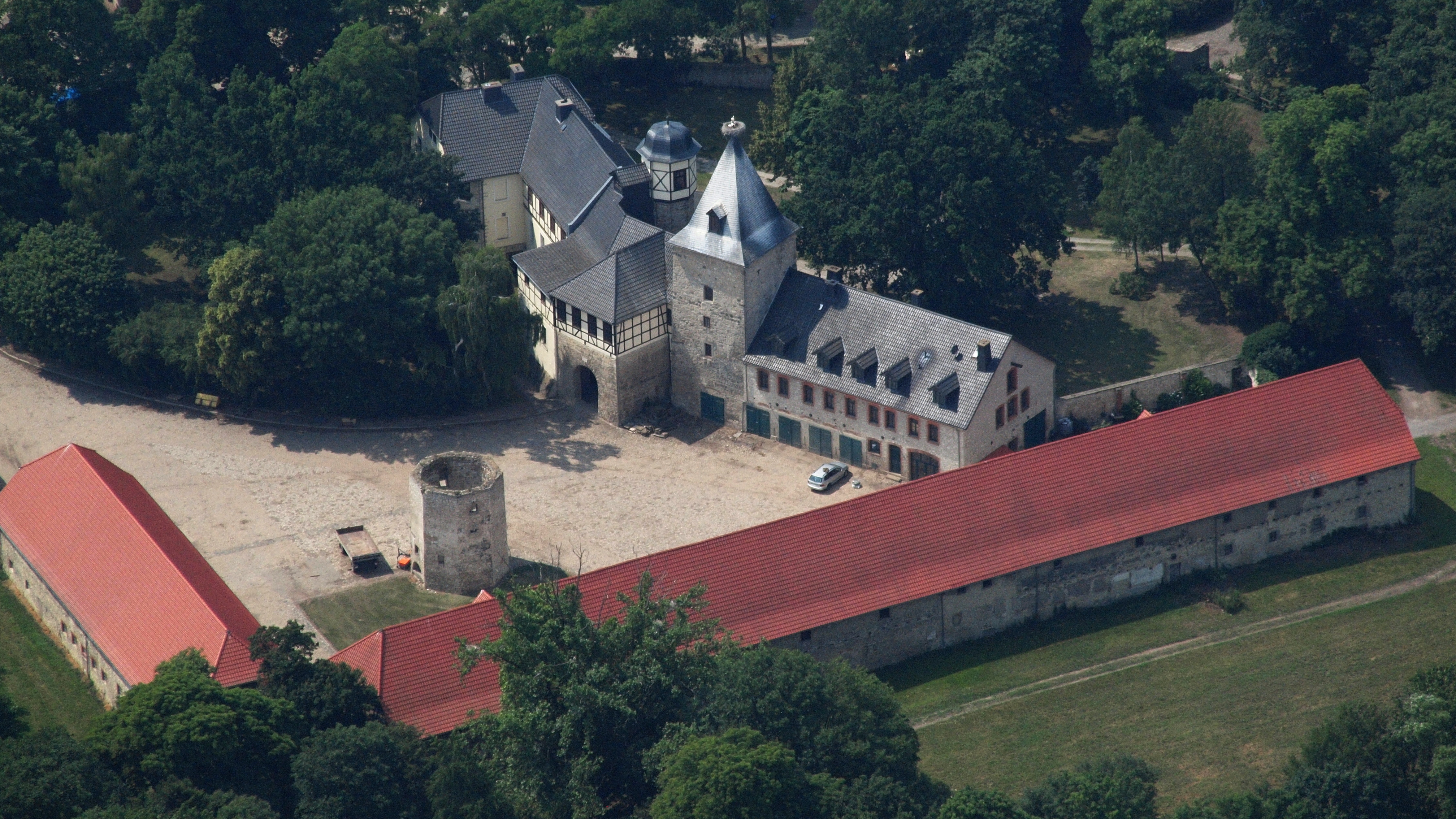 Burg Emersleben, Luftaufnahme (2015)